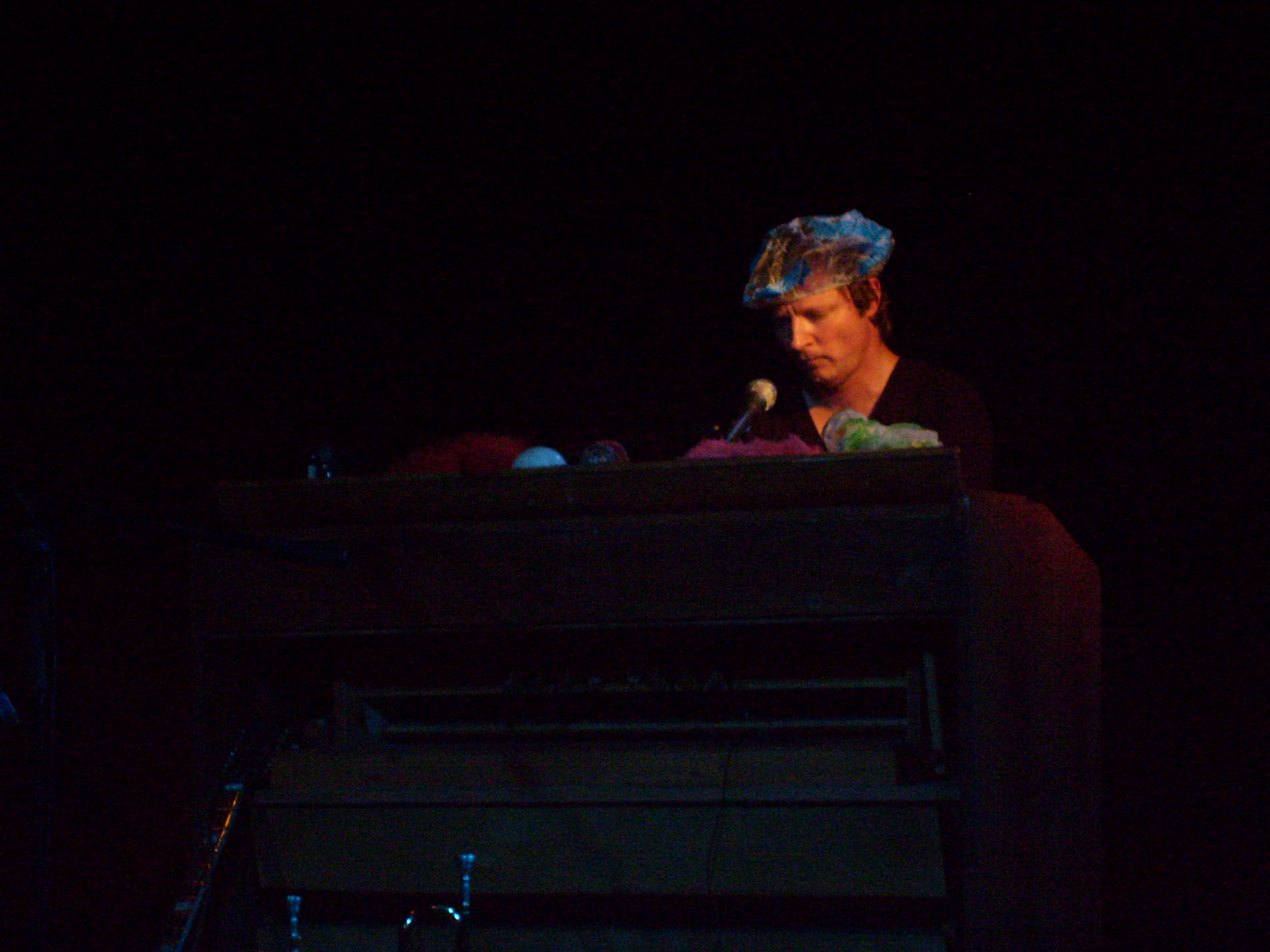 Petr Nikl, musician from the Czech Republic. Koncert v Praze na Dobešce, jako host skupiny Traband.